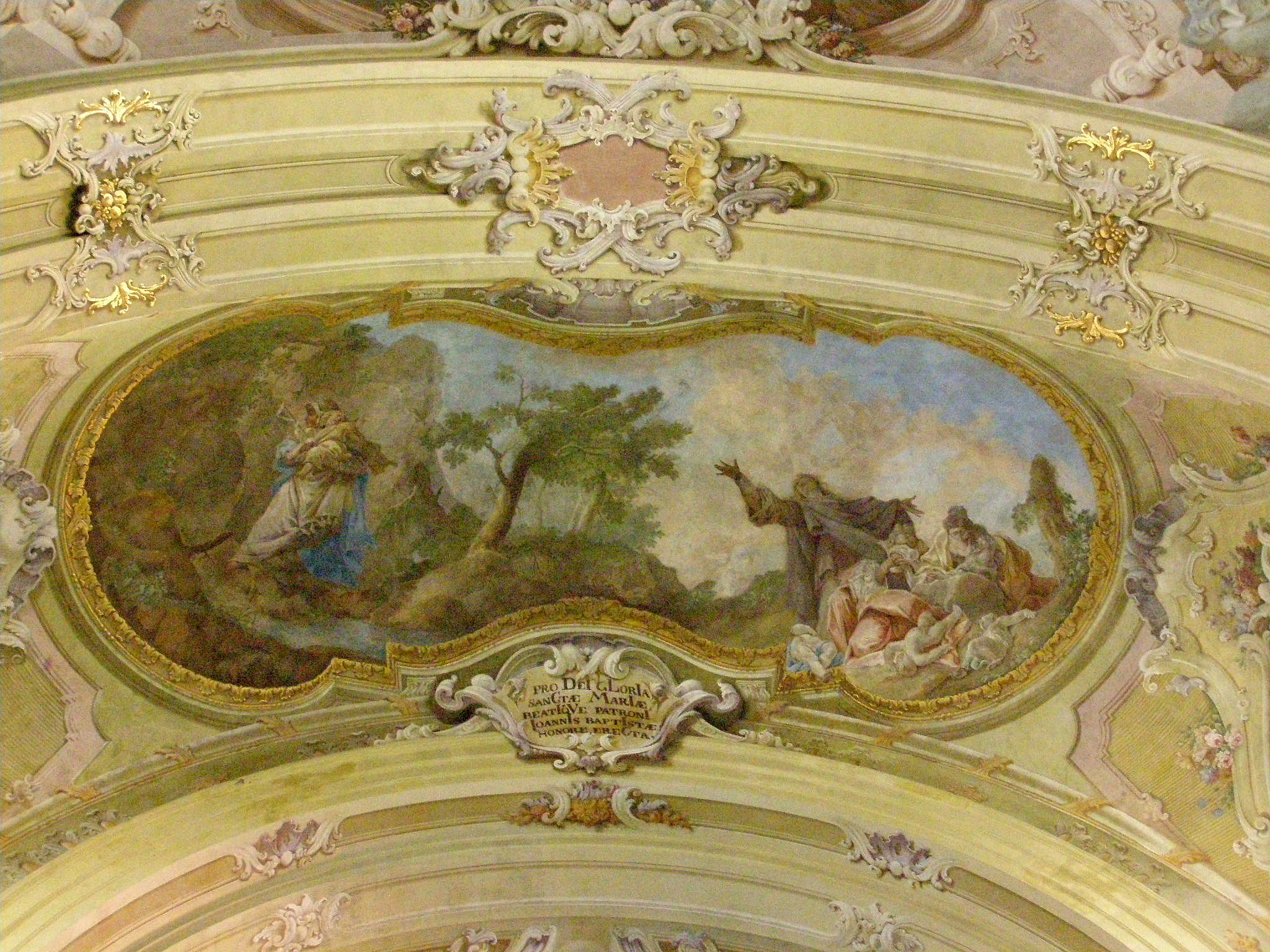 Freska v druhom klenbovom poli s námetom Úteku do púšte (vľavo) a Vraždenia neviniatok (vpravo)